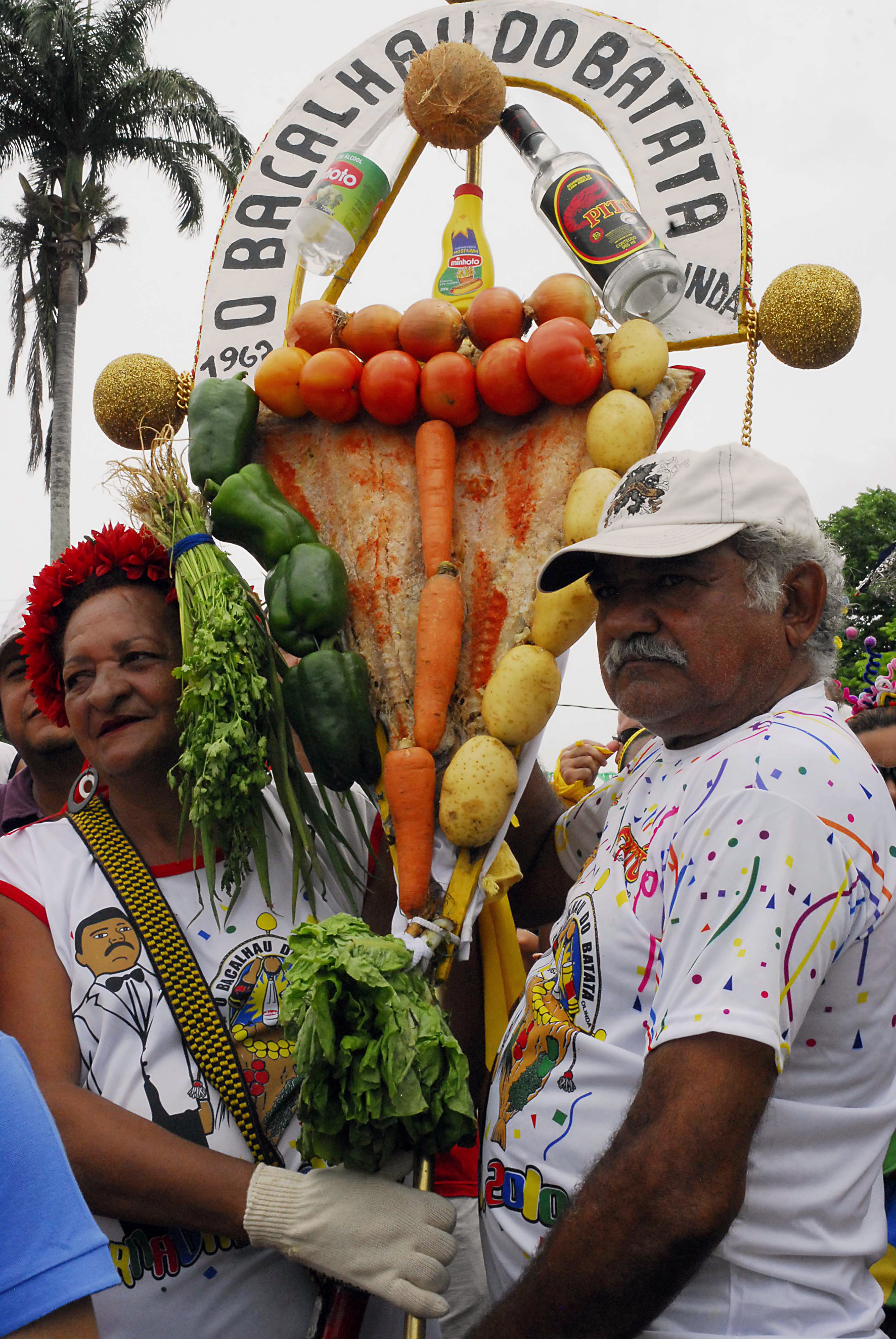 Bacalhau do Batata in Olinda, Pernambuco